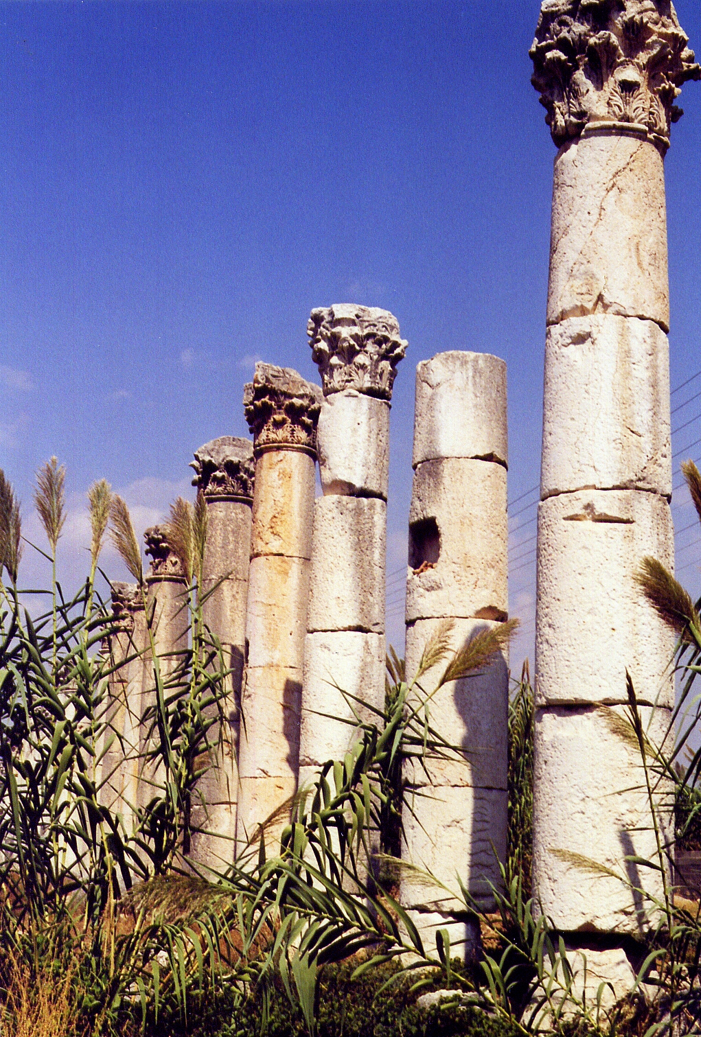 Säulenreihe, Reste einer Heiligen Straße in Soli, heute Viransehir, Ortsteil von Mersin, Südtürkei